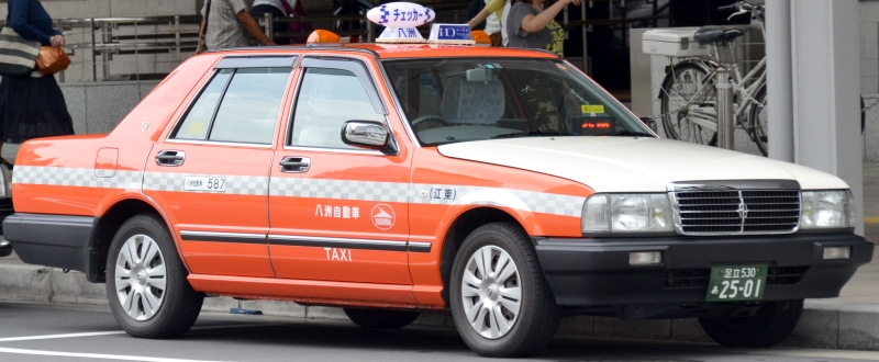 チェッカーキャブ無線に所属する八洲自動車のセドリック